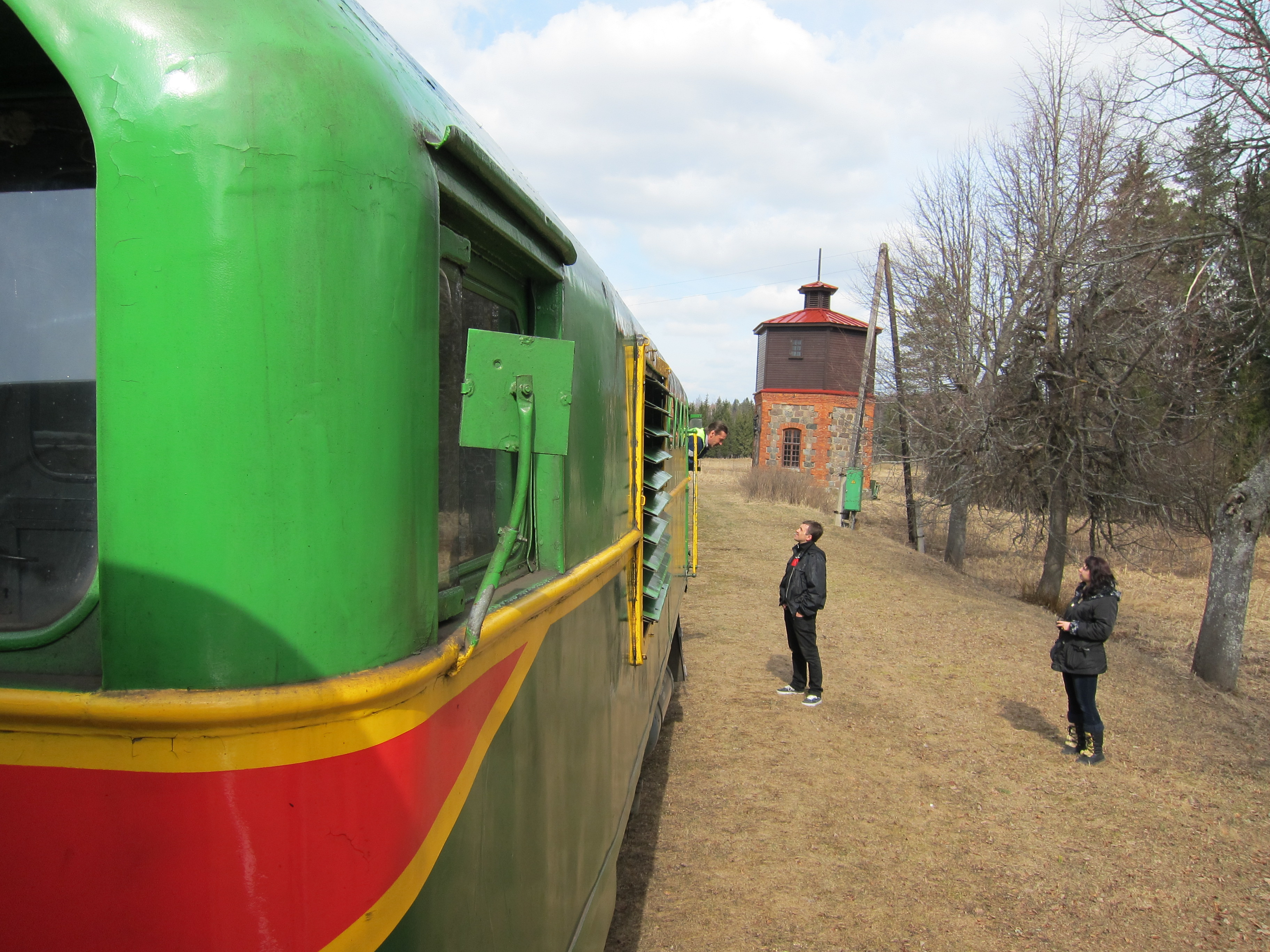 Papardes stacija